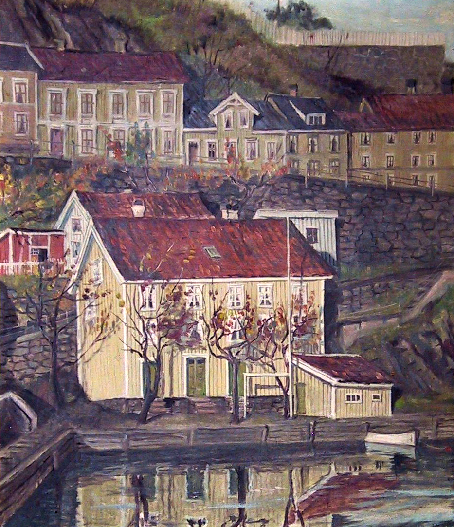 Det hvite hus på Sanden Arendal. Maleri av Fred Terkelsen.